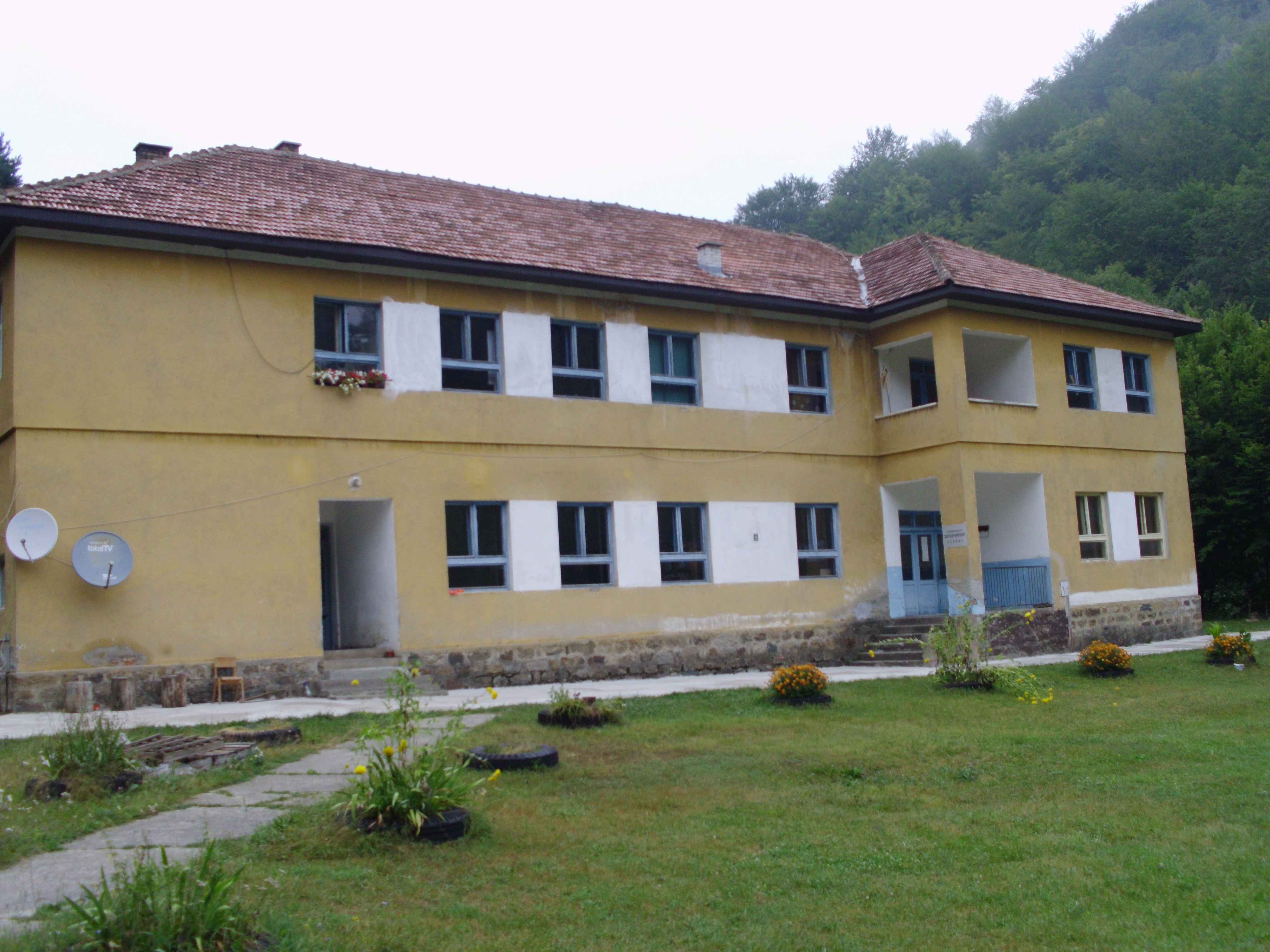 OŠ Svetozar Marković Kovilje